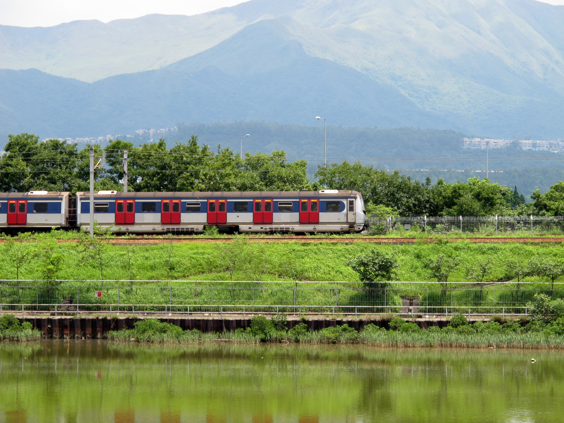 MLR Train near Tai Po Kau